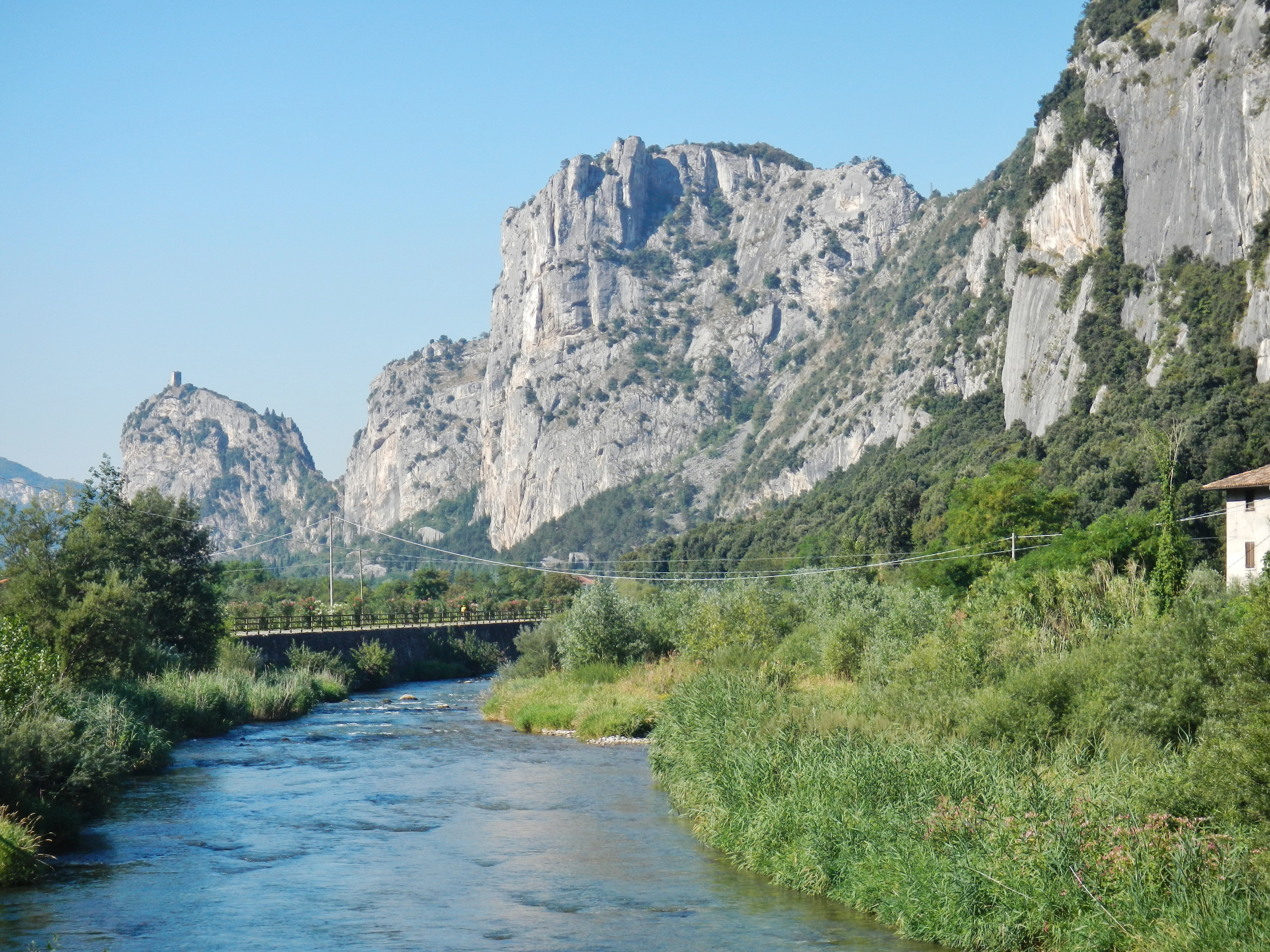 Blick über den Fluss Sarca zum Castello di Arco